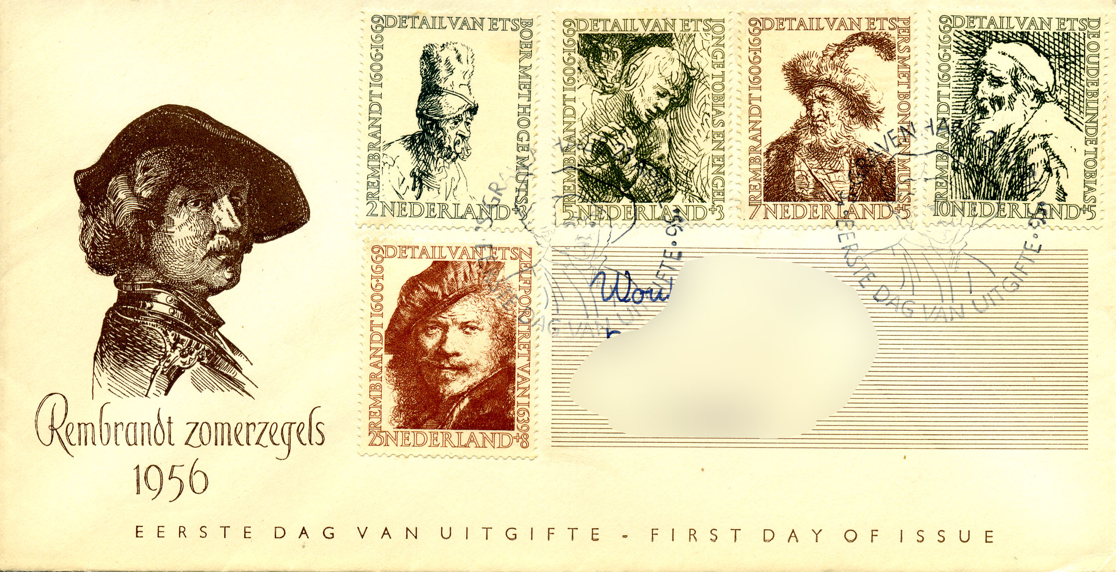 First day of issue 1956 Rembrandt zomerzegels